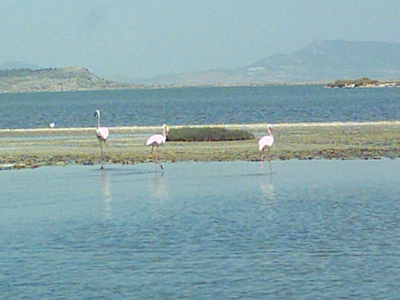 Kuş Cenneti